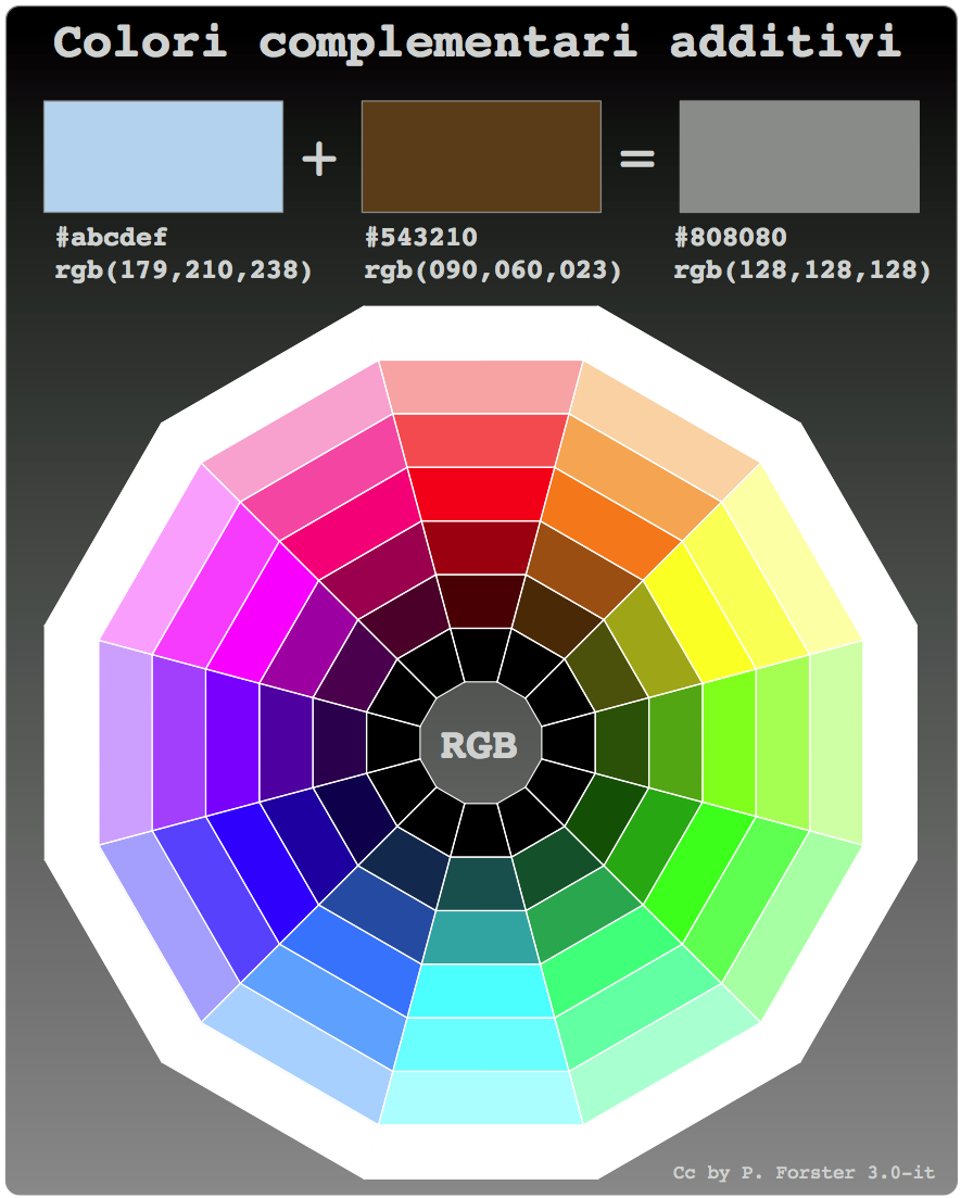 Ruota di colori RGB a dodici divisioni e cinque sfumature chiarite / scurite e un'esempio numerico